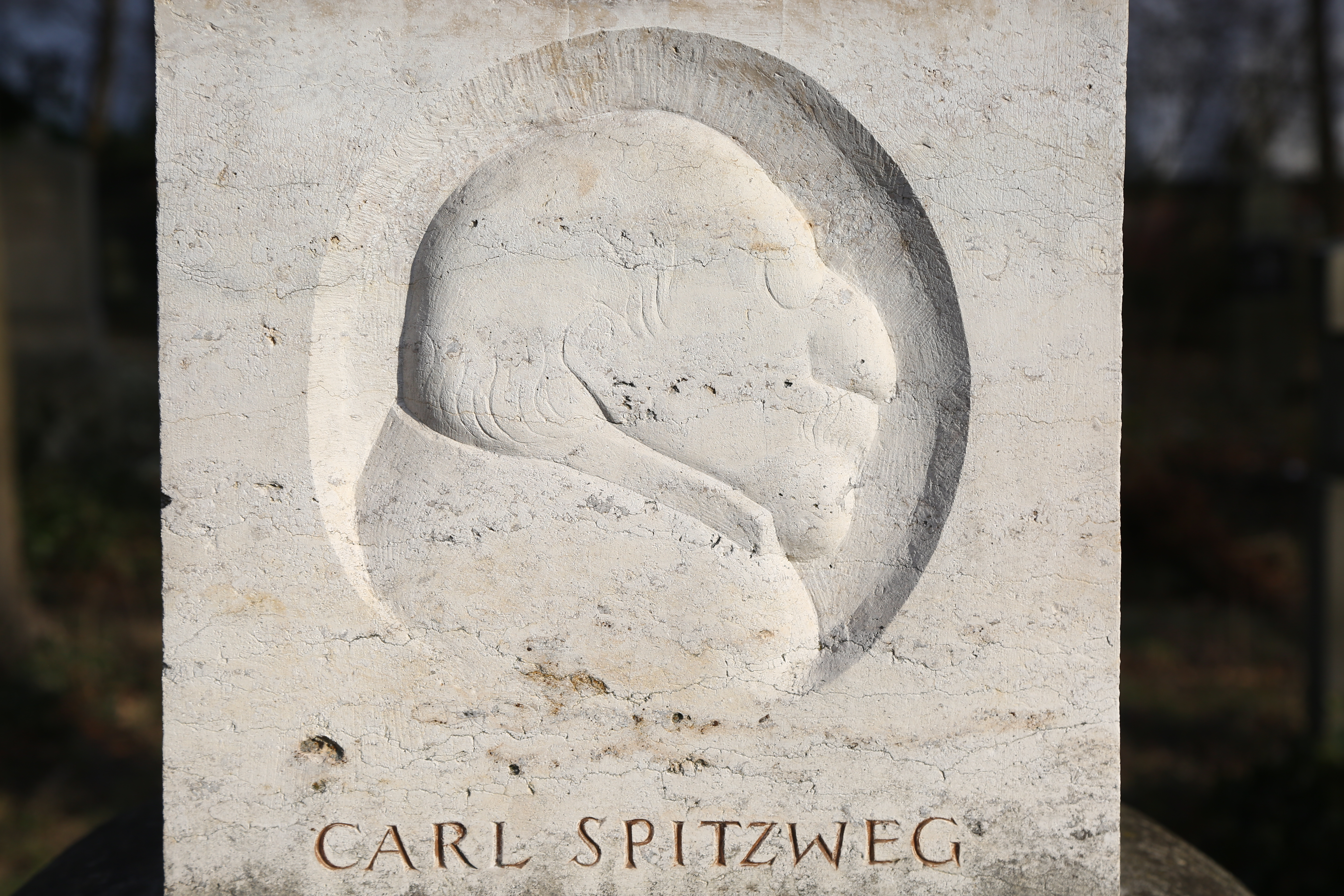 Carl Spitzweg (1808-1885), Relief auf dem Grabstein im Münchner Alten Südfriedhof